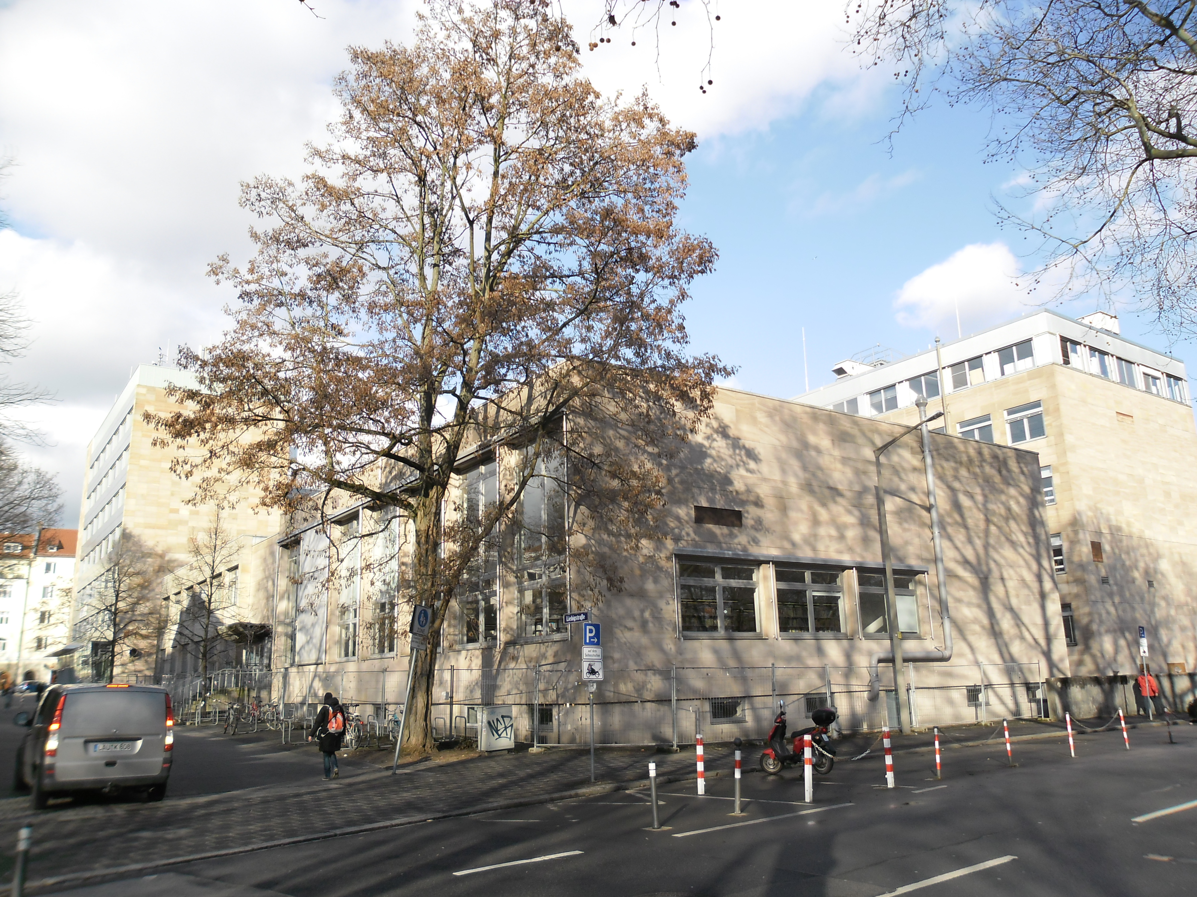 Gebäude des Standortes Kesslerplatz (KA-, KB- und KV-Gebäude) der Technischen Hochschule Nürnberg an der Liebigstraße im Stadtbezirk Wöhrd